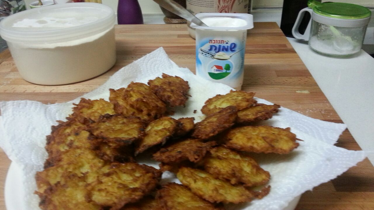 potato pancakes a Hanuka traditional dish